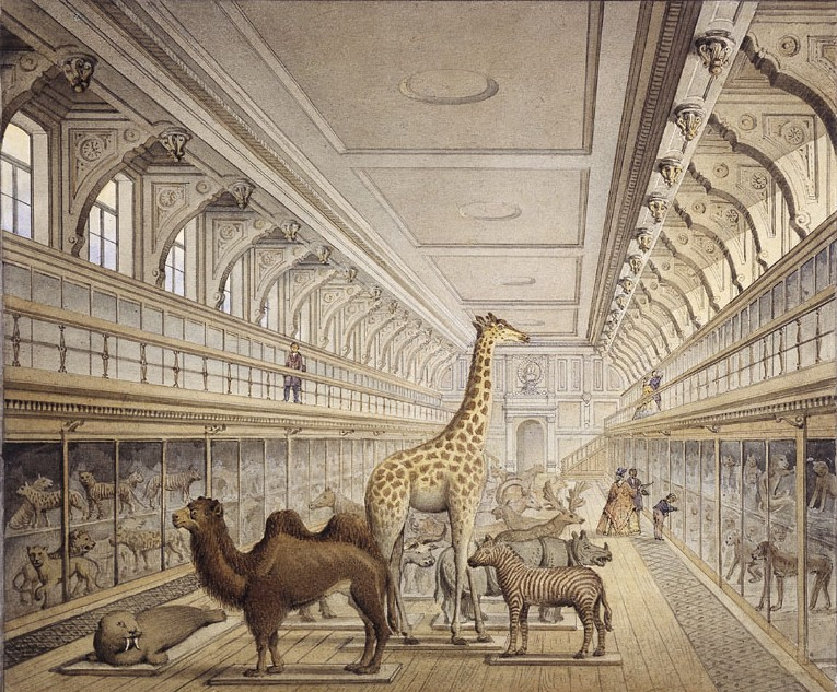 Museisal i Vetenskapsakademin vid Wallingatan i Stockholm